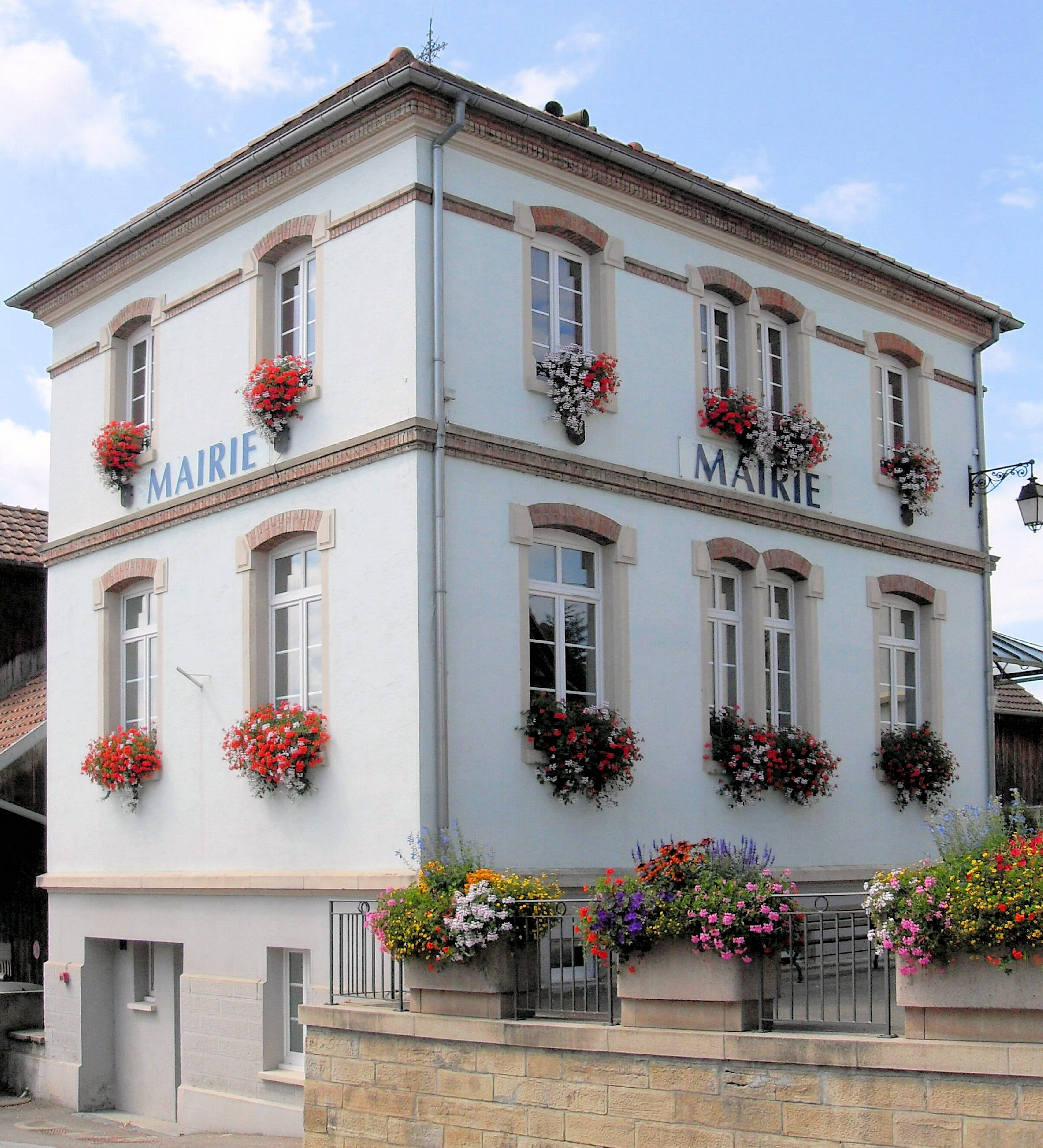 La mairie d'Attenschwiller